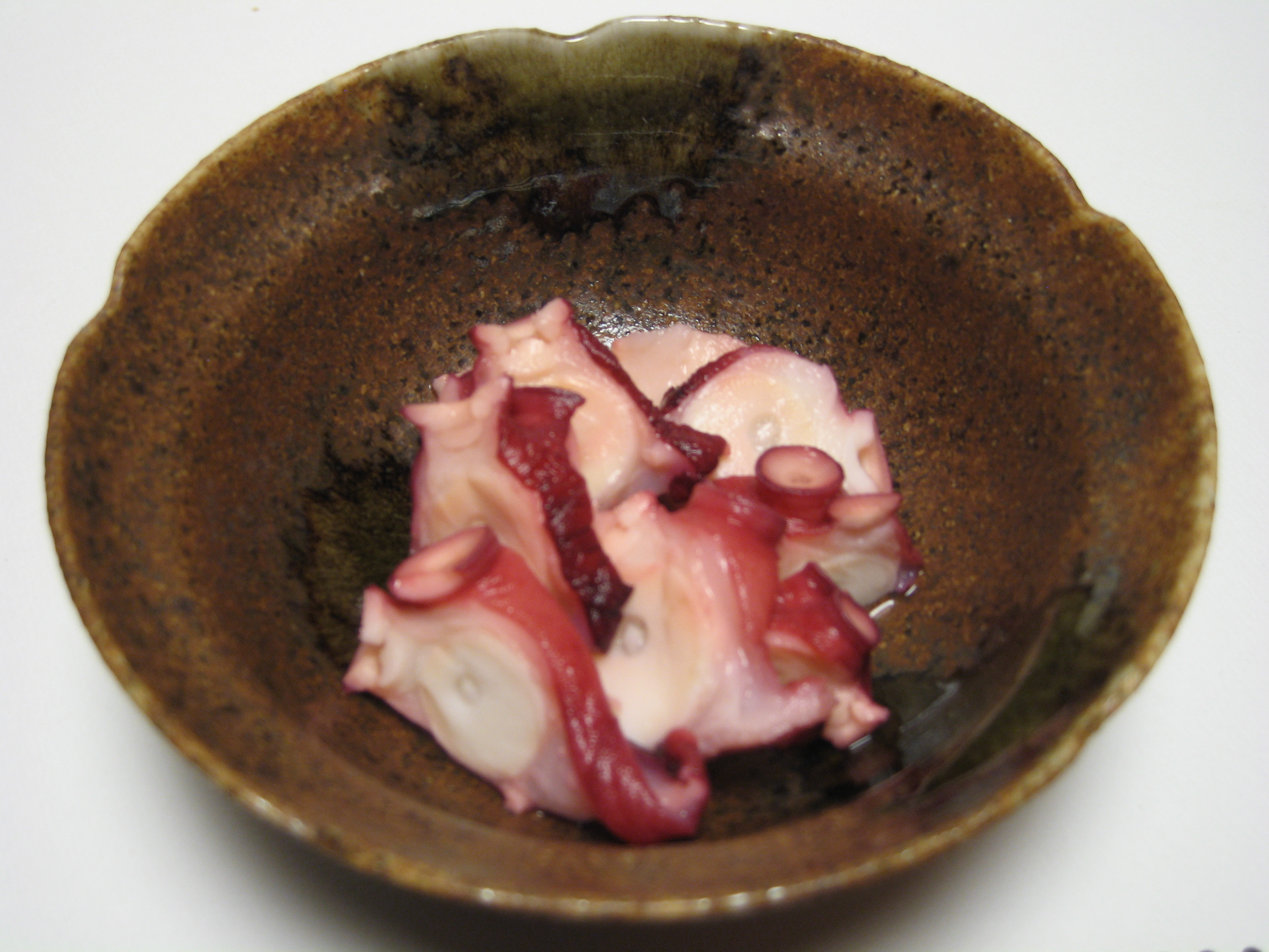 日本料理の酢蛸